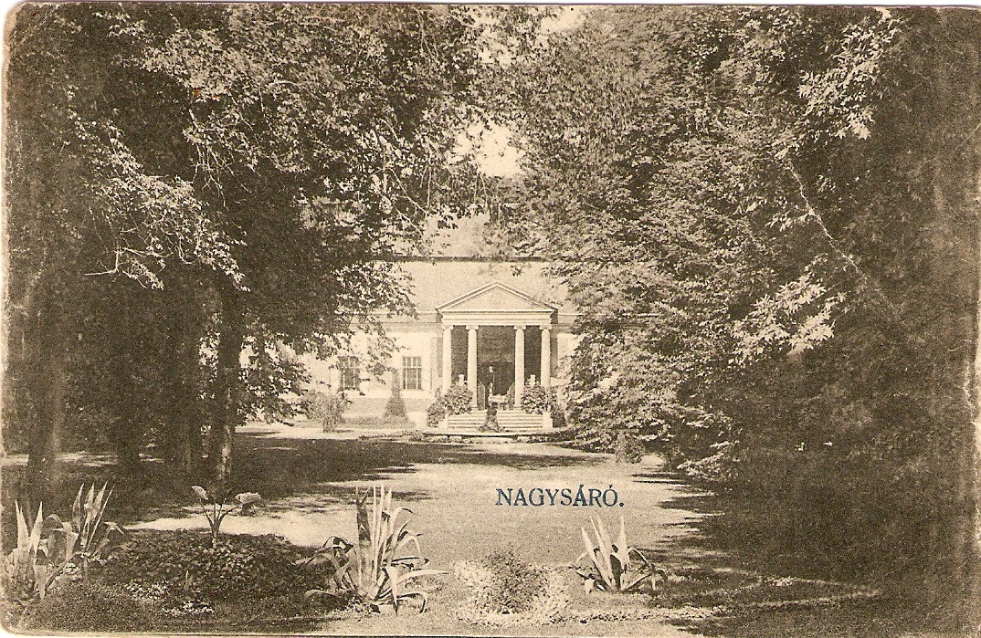 Nagysárói kastély (ma Šarovce, Szlovákia)